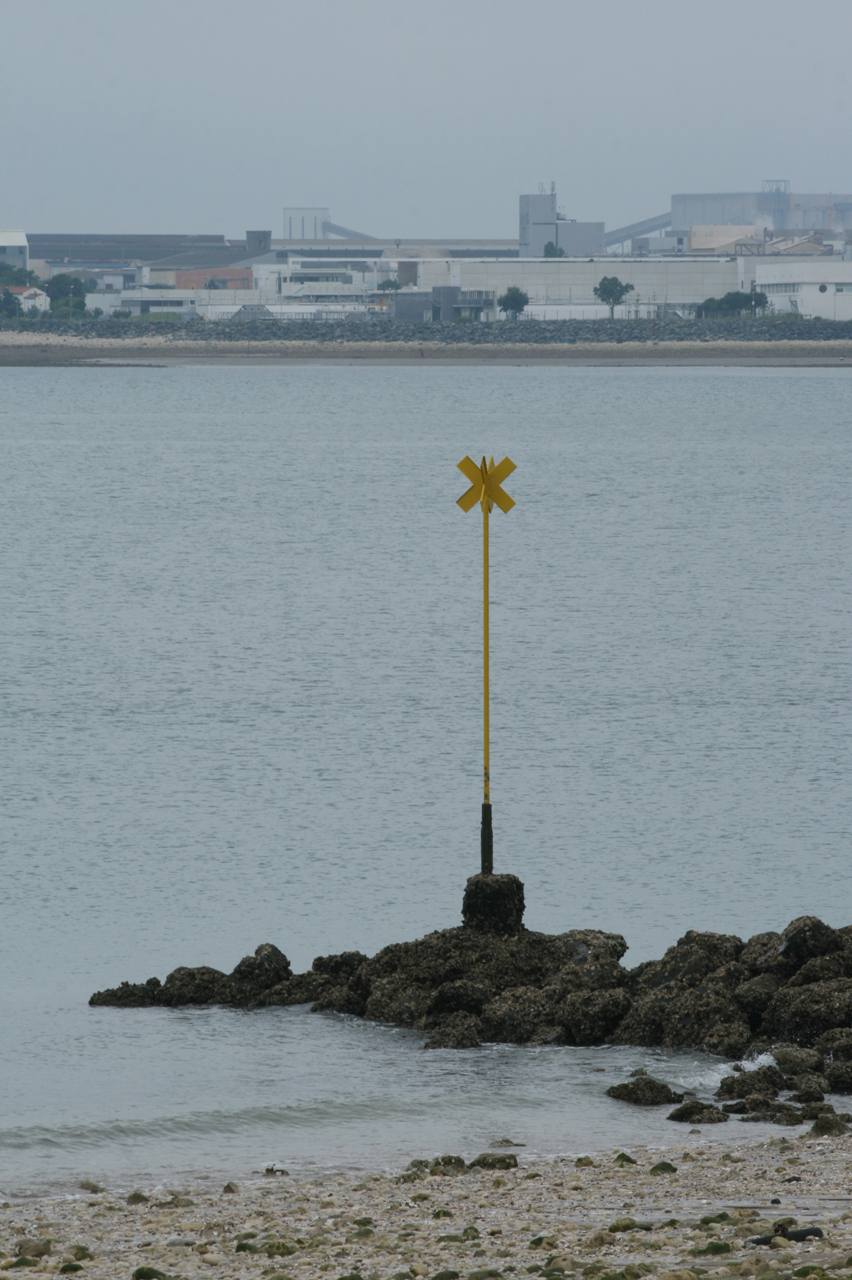 Marque speciale sur la plage de la Rochelle